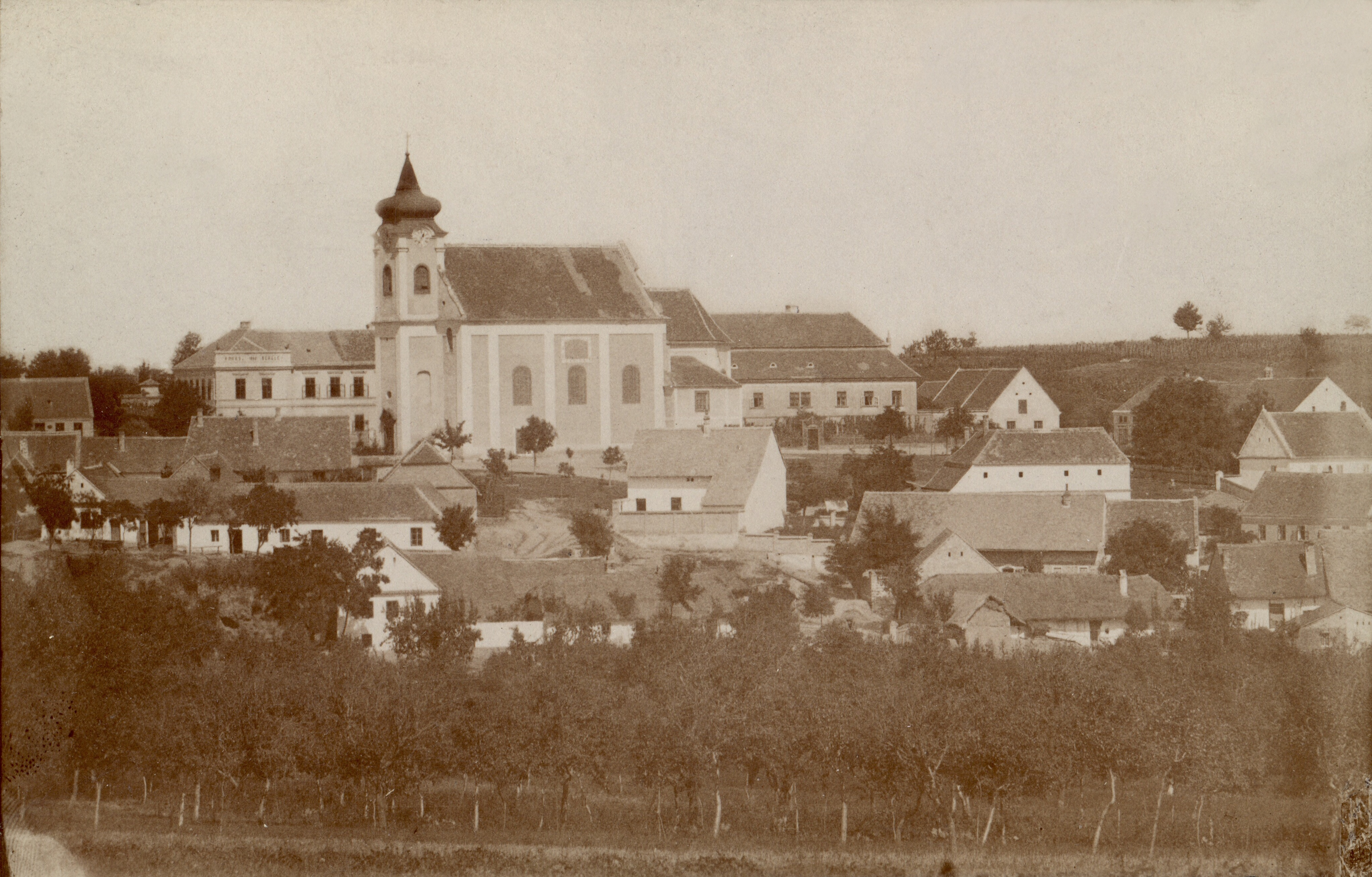 Starý snímek Miroslavi. Vydal Johann Schneider ve Vídni, 1895.